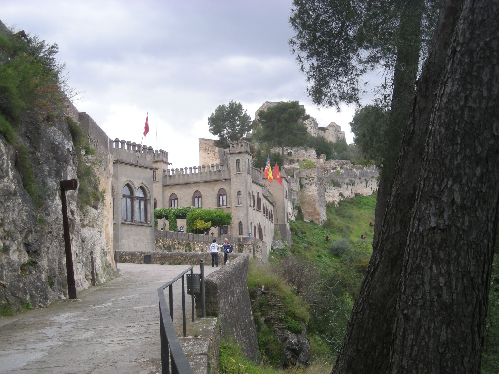 Entrada al castell de Xàtiva.